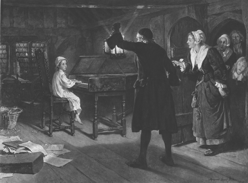 The child Handel, Lithographie nach einem Gemälde